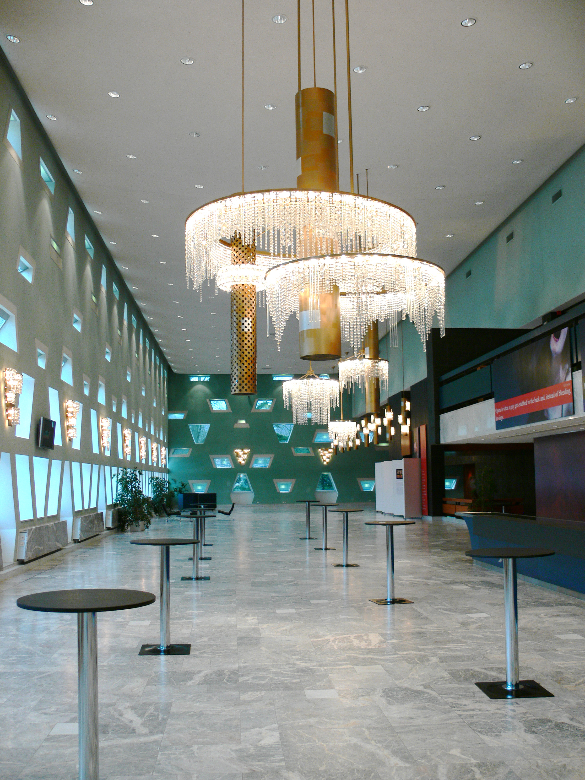 Grand théâtre de la ville de Luxembourg Foyer